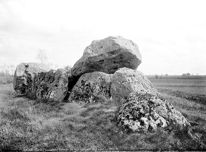 Dolmen de Quincampoix côté nord, Saint-Avit-les-Guespières, Eure-et-Loir (France), par Mieusement, avant 1893.